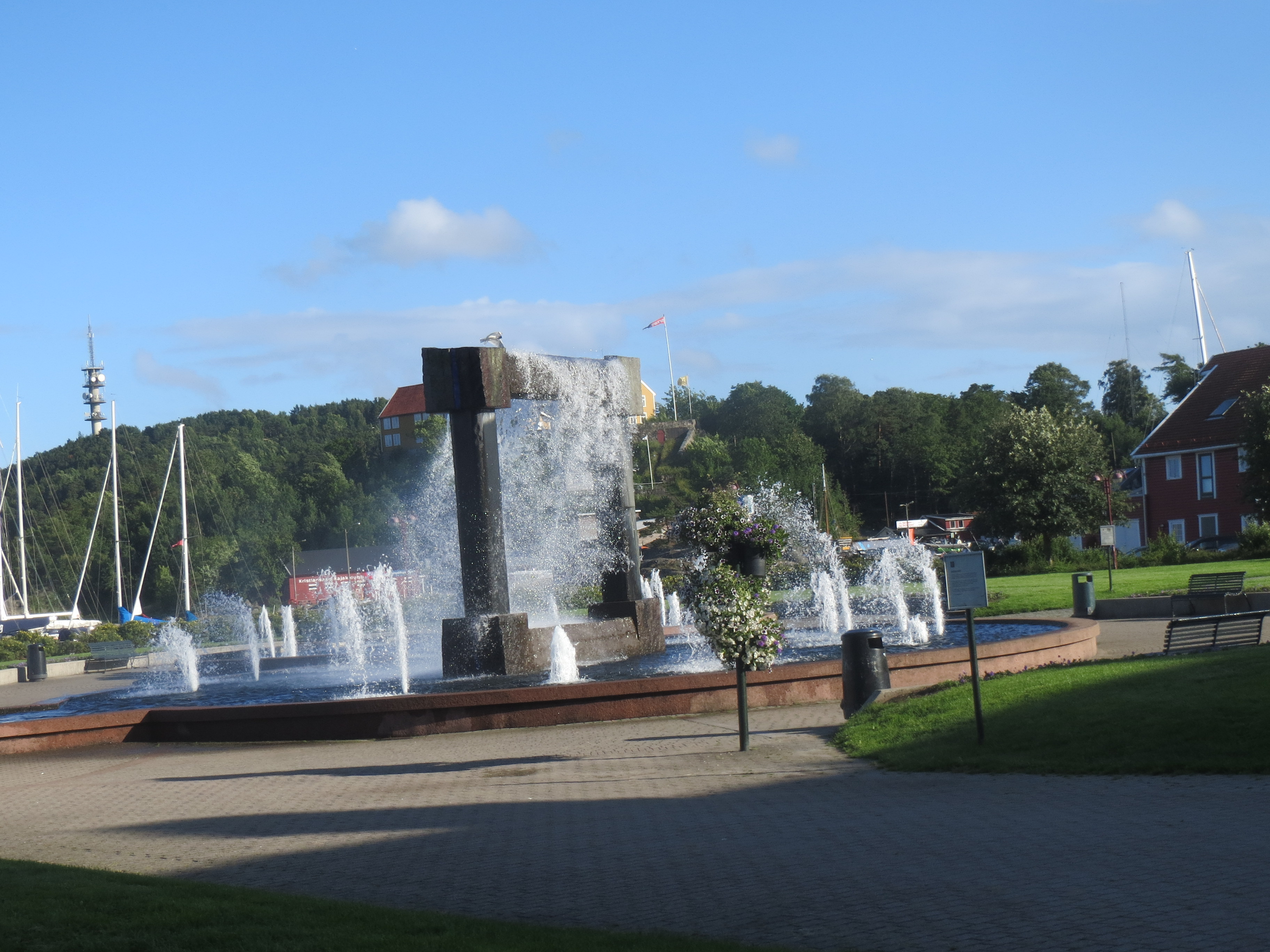 Nupenanlegget i Otterdalsparken, Kristiansand S